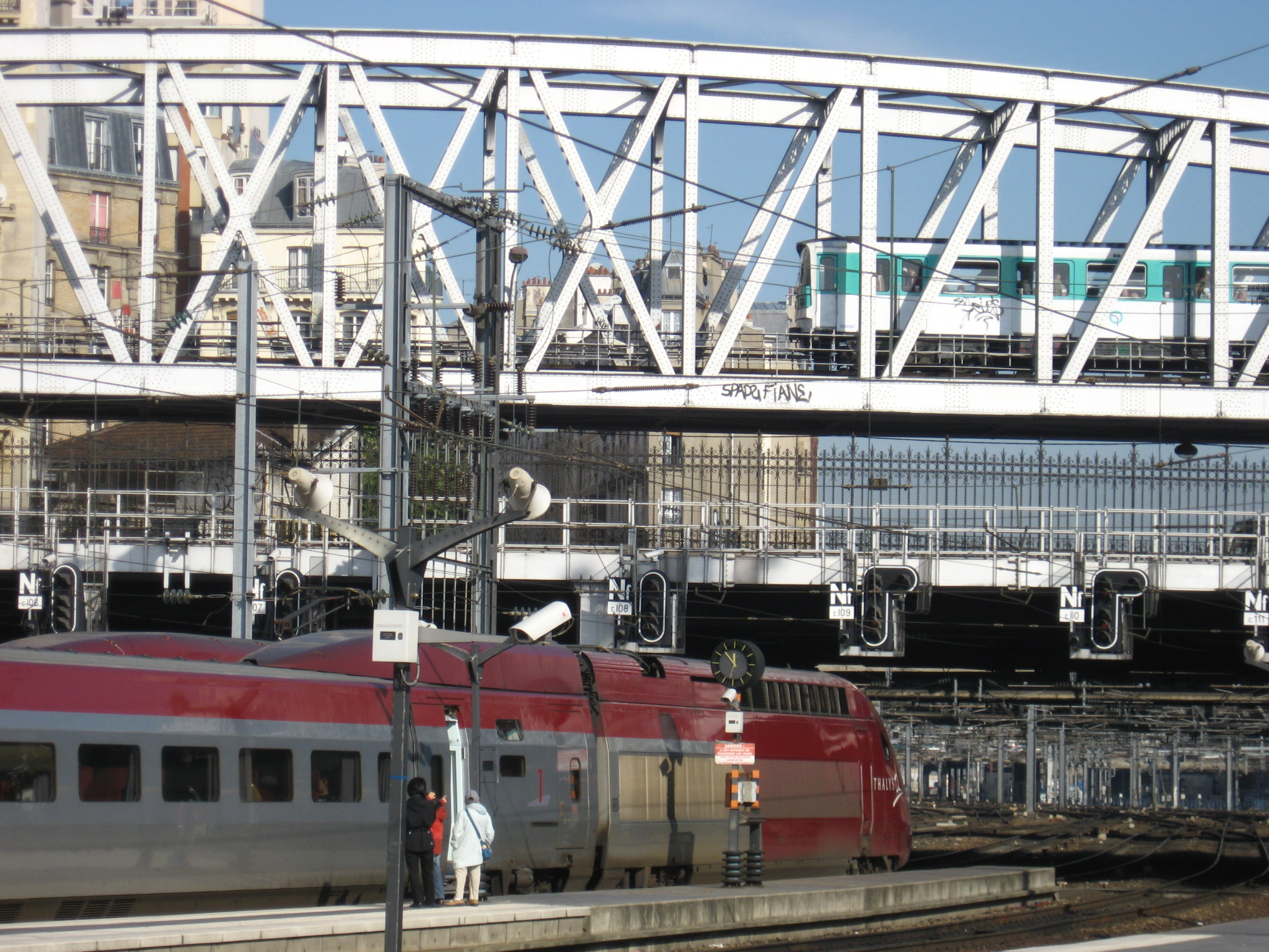 Thalys en metrotrein bij Gare du Nord